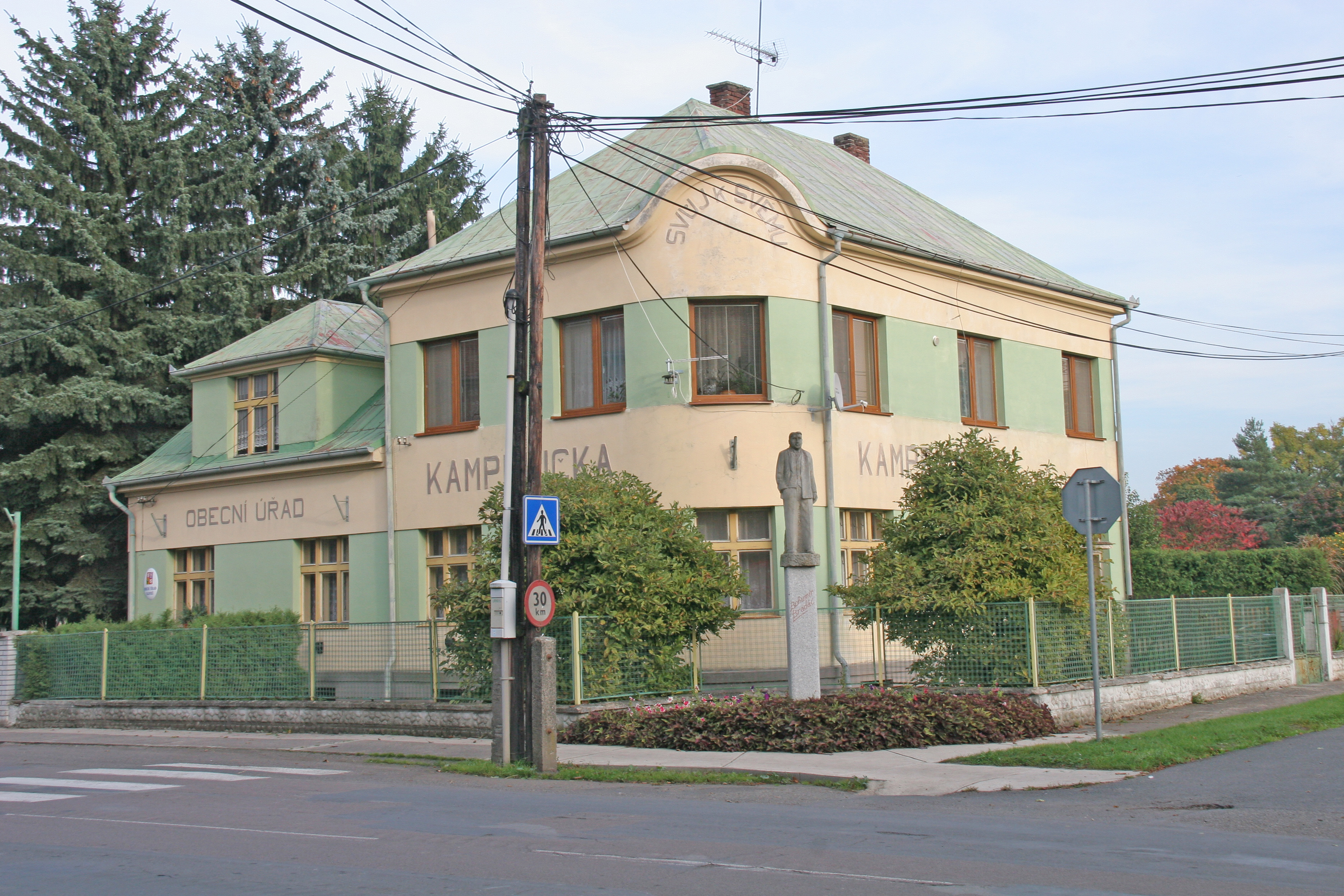 Sloveč obecní úřad